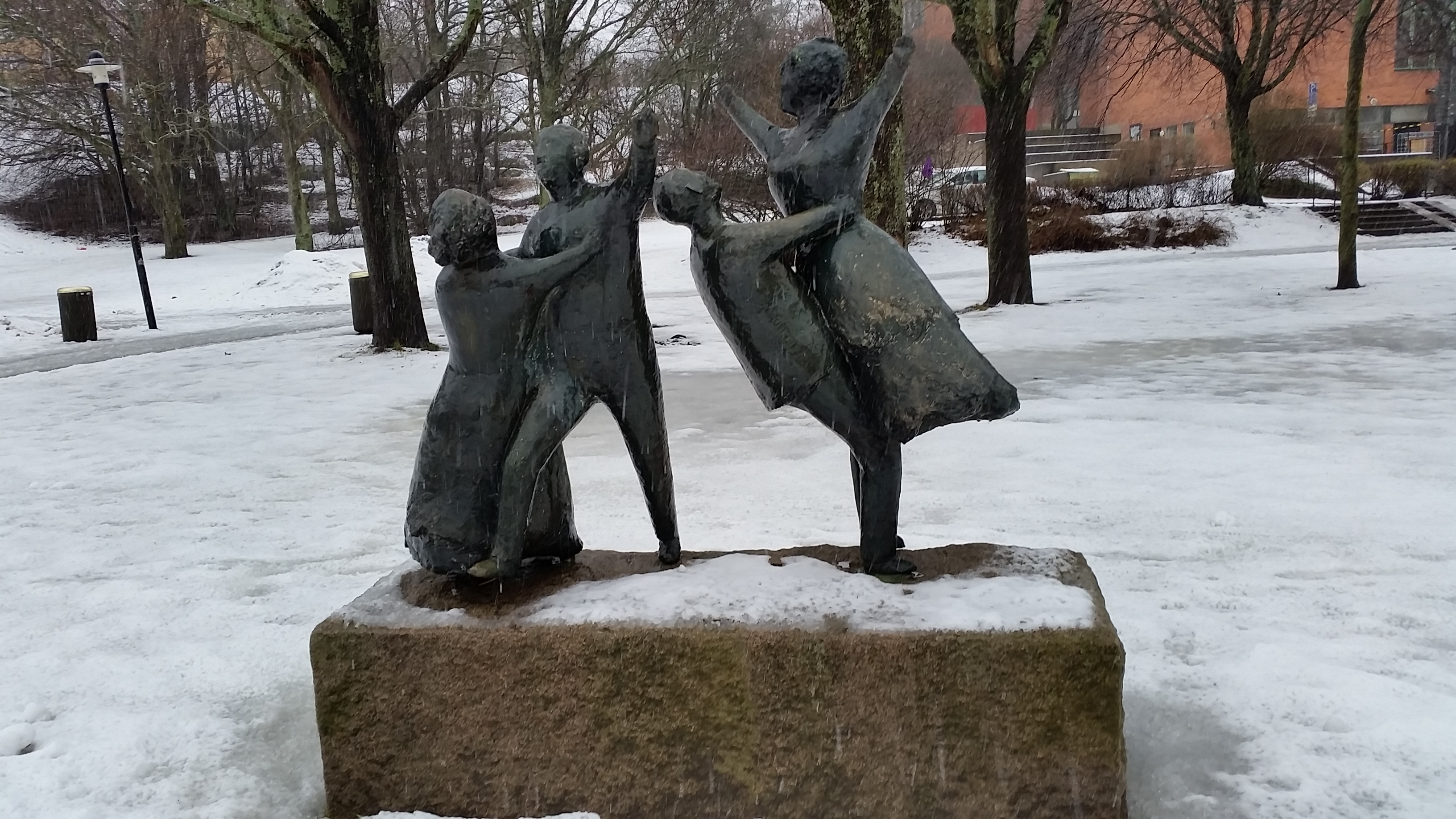 Det var dans bort i vägen (1961) av Lars Wellton, Skytteholmsparken, Solna It is not clear whether freedom of panorama applies to this image. This is a depiction of a work of art in Sweden. The depicted work is believed to be protected by copyright. According to Article 24 of the Swedish copyright act, "Works of art may be depicted if they are permanently placed on or at a public place outdoors. Buildings may be freely depicted." It has been widely accepted that this provision made distribution of depictions such as this one legal. On 4 April 2016, however, the Supreme Court of Sweden issued a statement that Article 24 does not extend to publication in online repositories, and on 6 July 2017, a lower court ruled that linking to depictions of copyrighted artworks hosted on Commons constitutes copyright infringement. See COM:CRT/Sweden#Freedom of panorama for more information. The implications of these decisions on Commons' ability to continue to distribute this and other depictions like it are currently under analysis. Reusing or linking to this file may have legal consequences. You are solely responsible for ensuring that you do not infringe the copyright belonging to someone else. See our general disclaimer for more information.